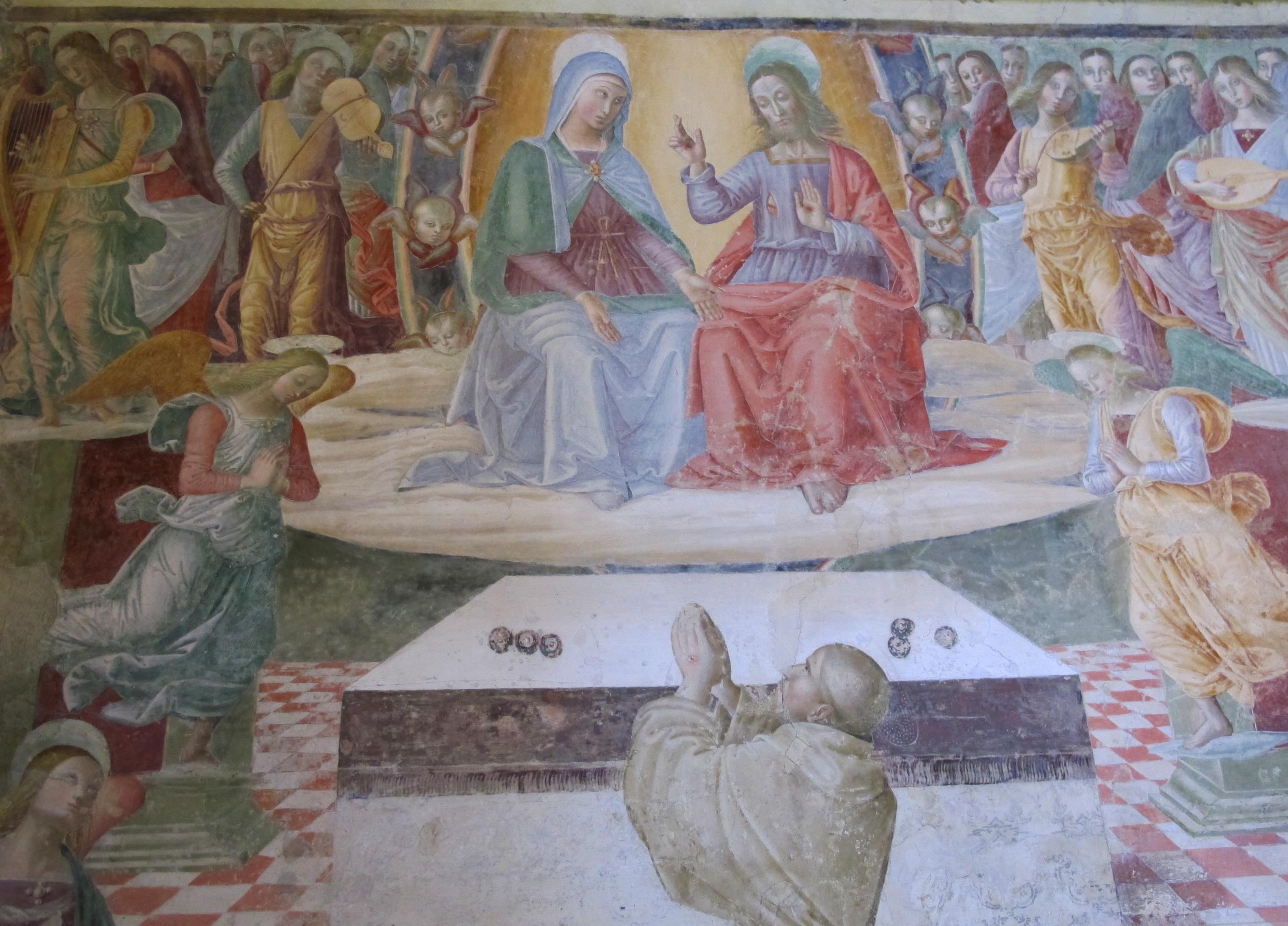 Cappela del roseto, affreschi di tiberio d'assisi, 1518, 06.1